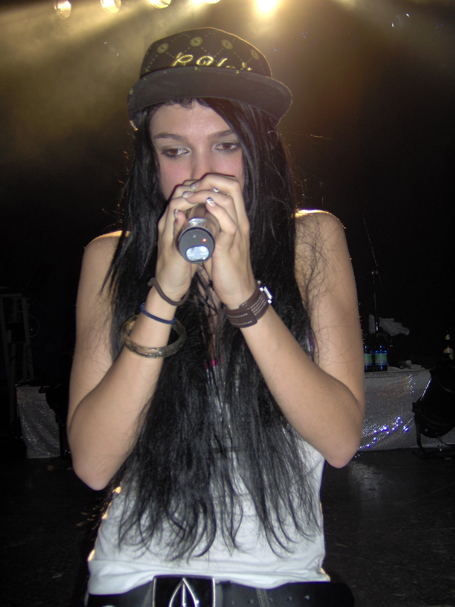 Börni am 30.05.2008 bei einem Konzert in Luzern